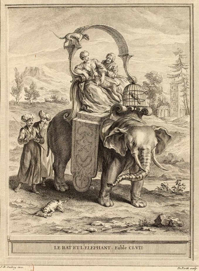 Gravure réalisée par Deferth d'après un dessin de Jean-Baptiste Oudry représentant la fable Le rat et l'éléphant de Jean de La Fontaine (fable 15 du livre VIII). Cette gravure est parue dans l'édition complète des fables de La Fontaine, parue en quatre tomes chez l'éditeur Desaint & Saillant, rue saint Jean de Beauvais à Paris, 1755-1759.